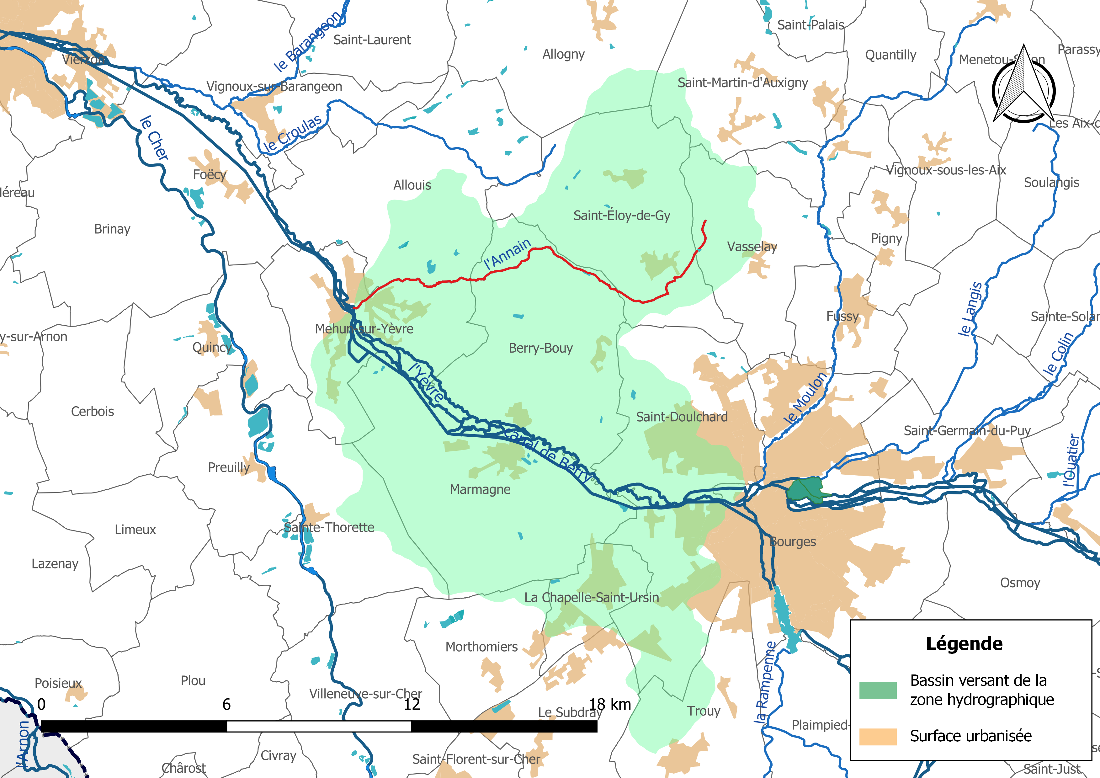 Carte du cours d'eau « l'Annain » (France) et de la zone hydrographique dans laquelle il s'insère.